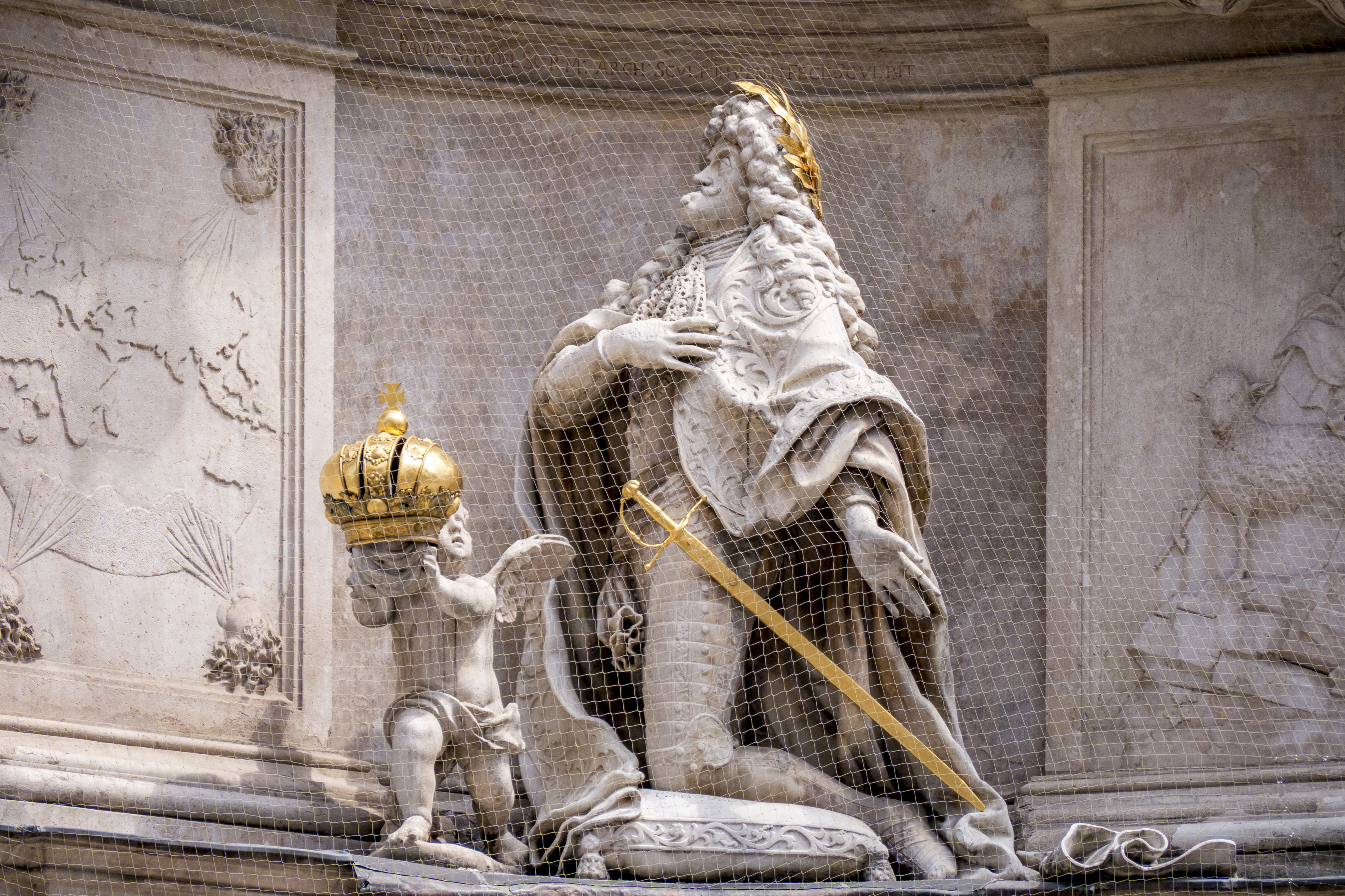 Hl. Dreifaltigkeit und zu den 9 Chören der Engel